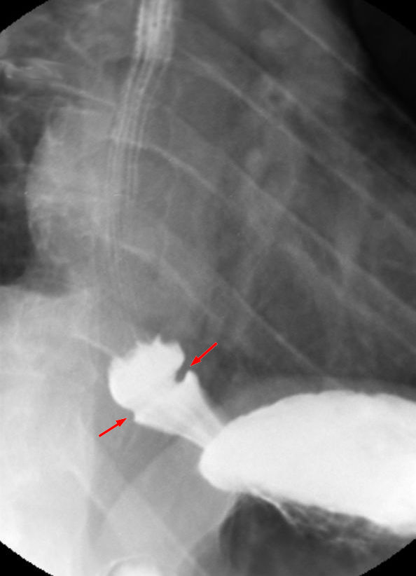 Schatzkiring (auch Schatzki-Gary-Ring oder B-Ring des Ösophagus) in der Breischluckuntersuchung. Der Ring befindet sich unmittelbar am ösophagogastralen Übergang (anders als A-Ringe, die etwas höher im Ösophagus selbst sind) und ist daher oft nur bei einer gleichzeitig bestehenden Hiatushernie darstellbar.